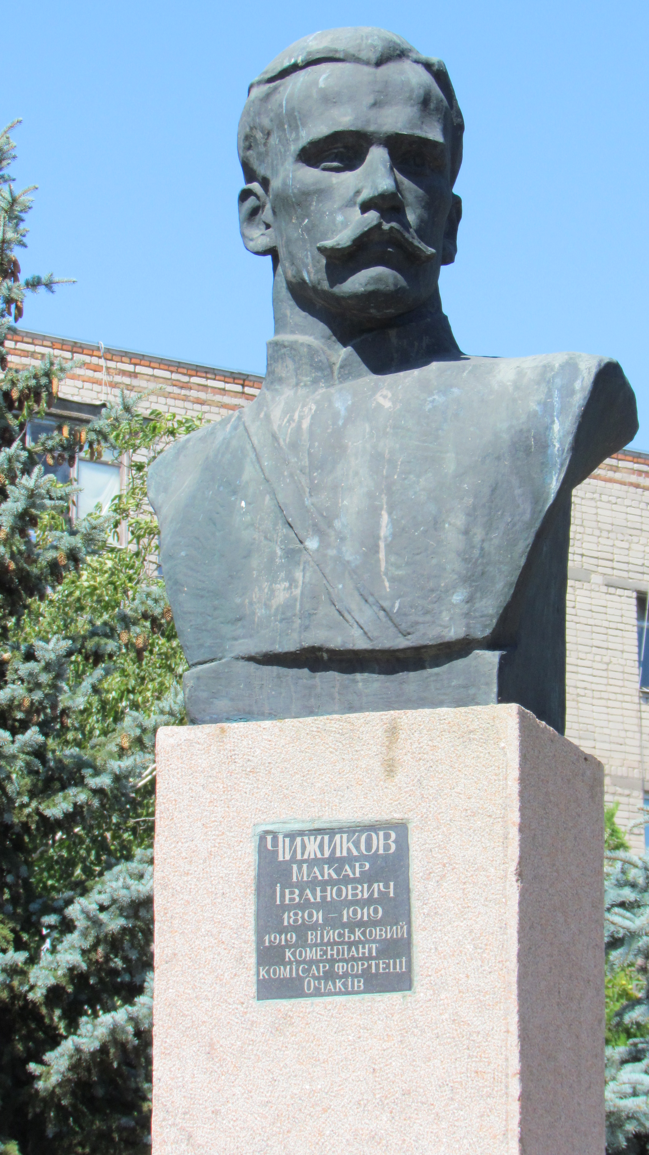 Очаків